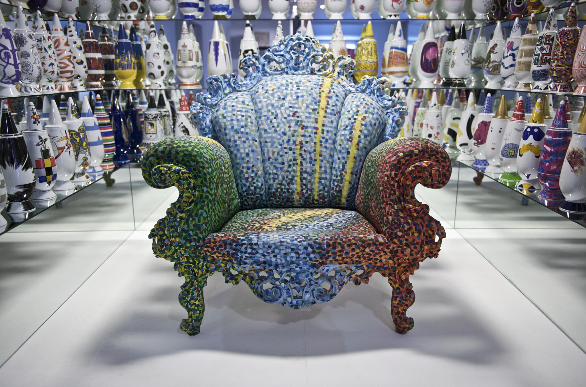 Gaetano Pesce